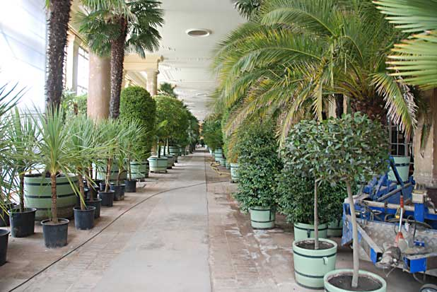 Limburgs: Orangerieplante bie kesjtièl Sans Souci in Berlien